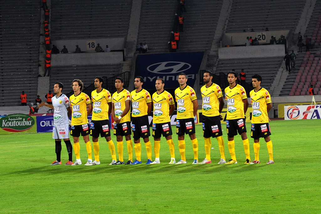 RCA vs MAS